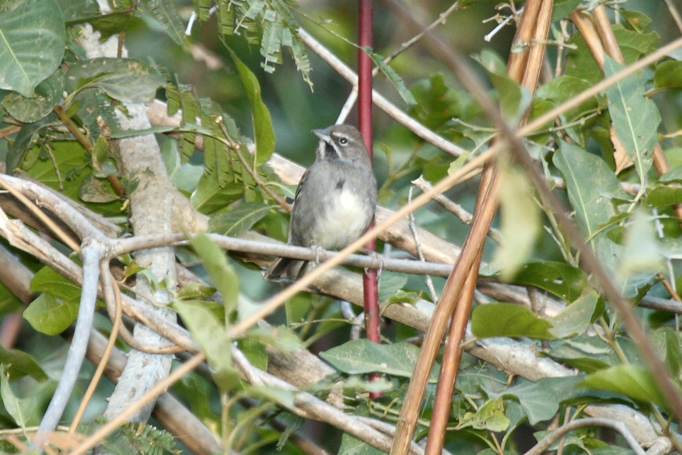 Five-striped Sparrow Amphispiza quinquestriata, Zacatecas, Mexico